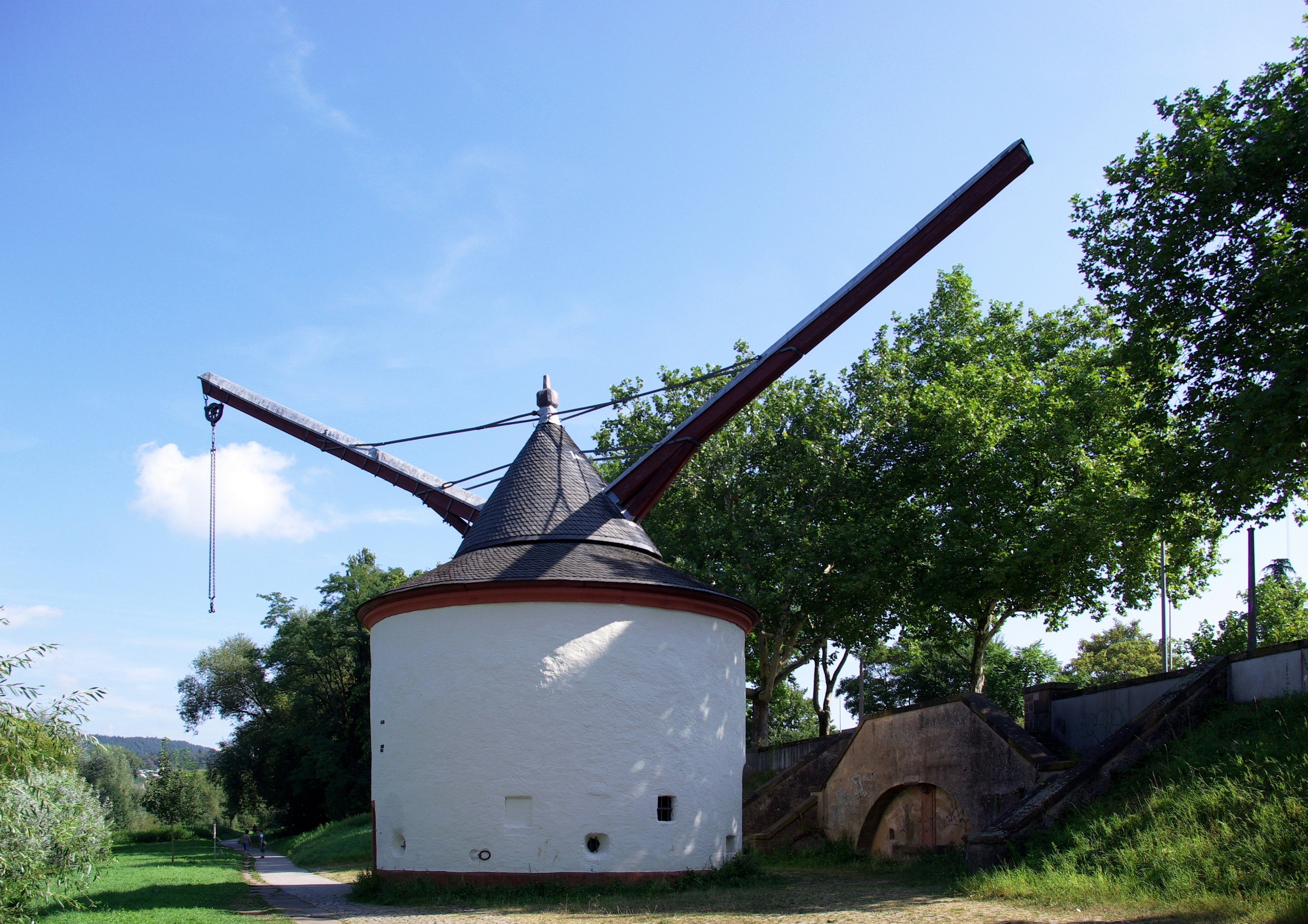 Trier, "Alter Krahnen" am Moselufer. Tretradkran, zylindrischer Bau, drehbares Kegeldach, gebaut 1413, Umbau um 1630, zweiter Ausleger 1778, Anbau mit offener Feuerstelle